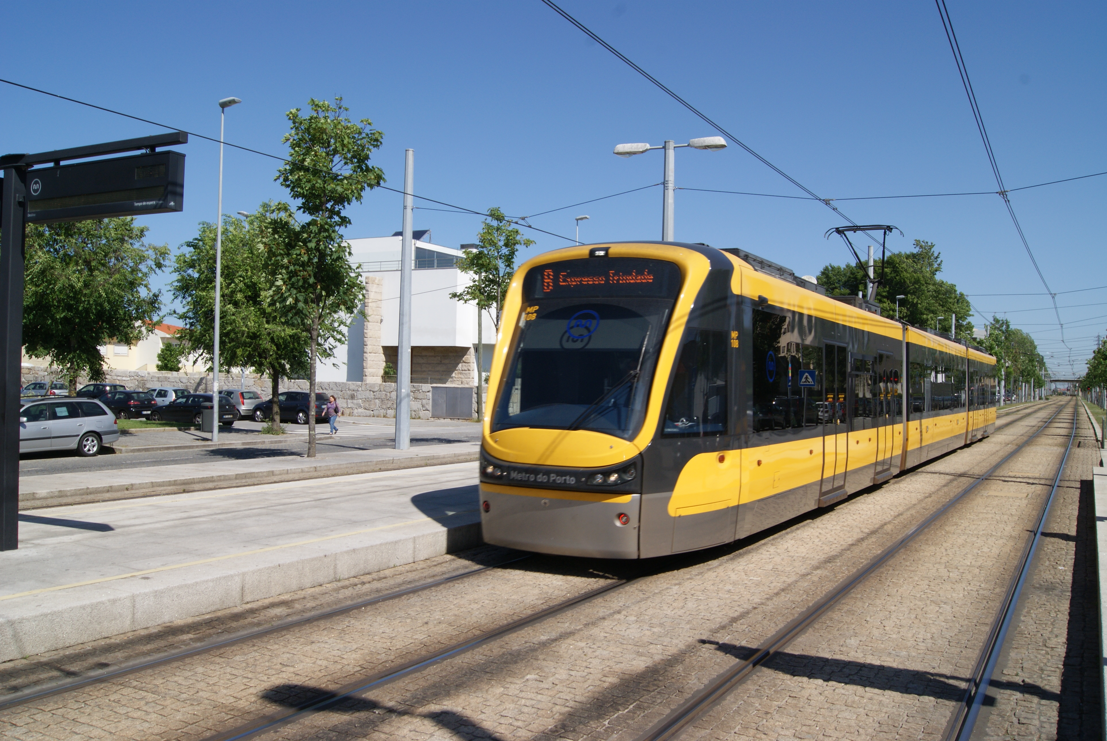 Photo. Trams aux Fils. Pour moi, ce n'est pas un métro, pas un tram et pas un train, mais les trois à la fois.